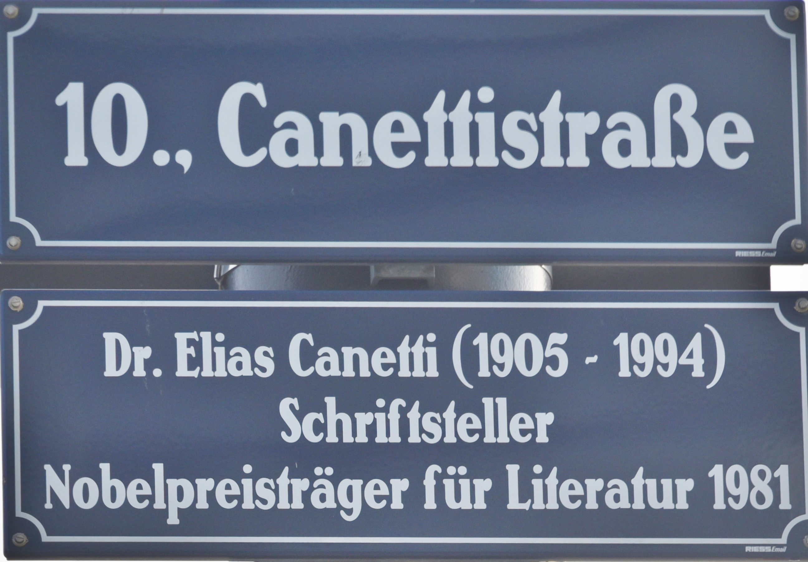 Strassenschild in Wien - Canettistraße